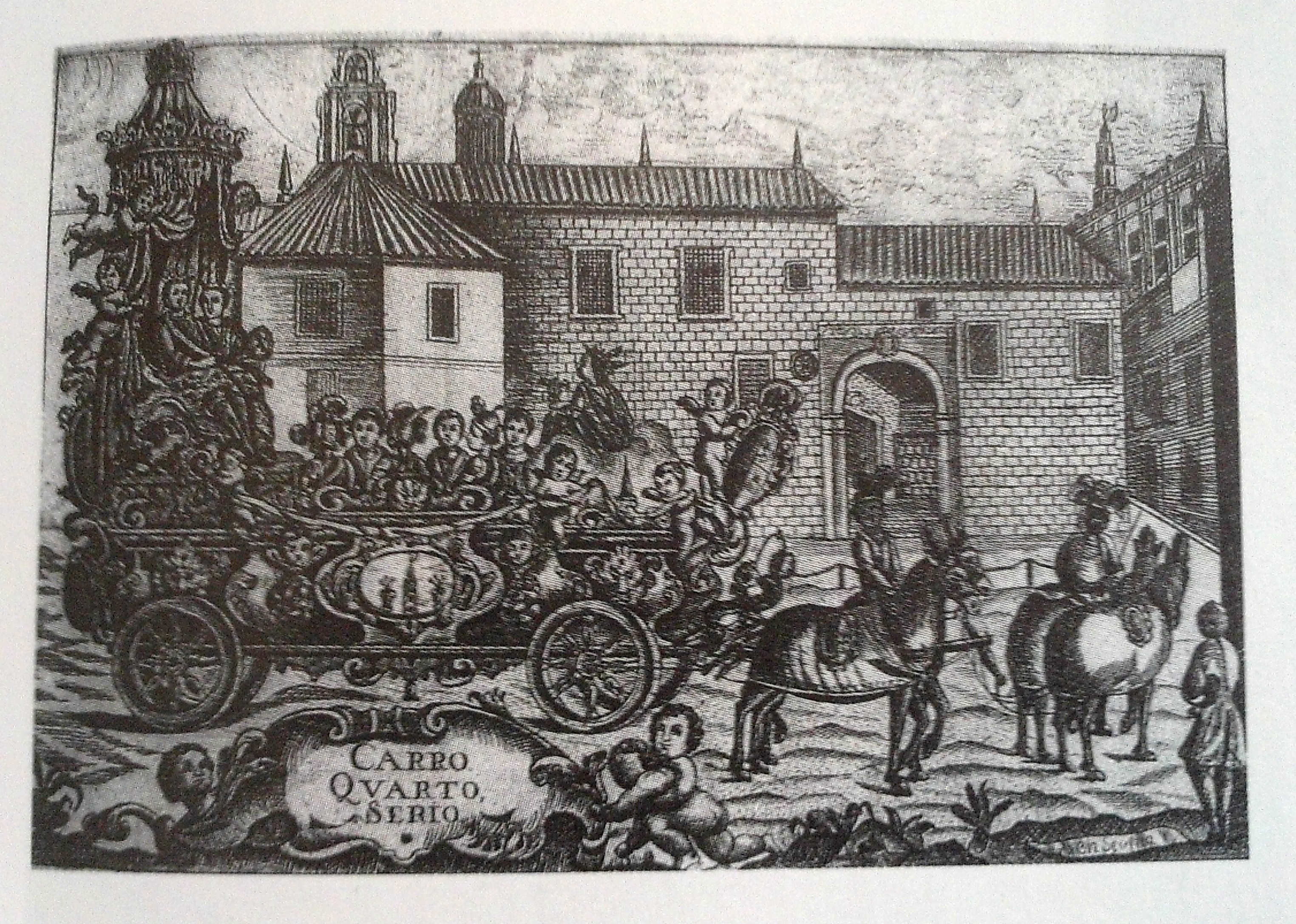 Un desfile pasando frente al colegio de Santo Tomás. Litografía titulada Carro cuarto viejo. Sevilla, Andalucía, España.